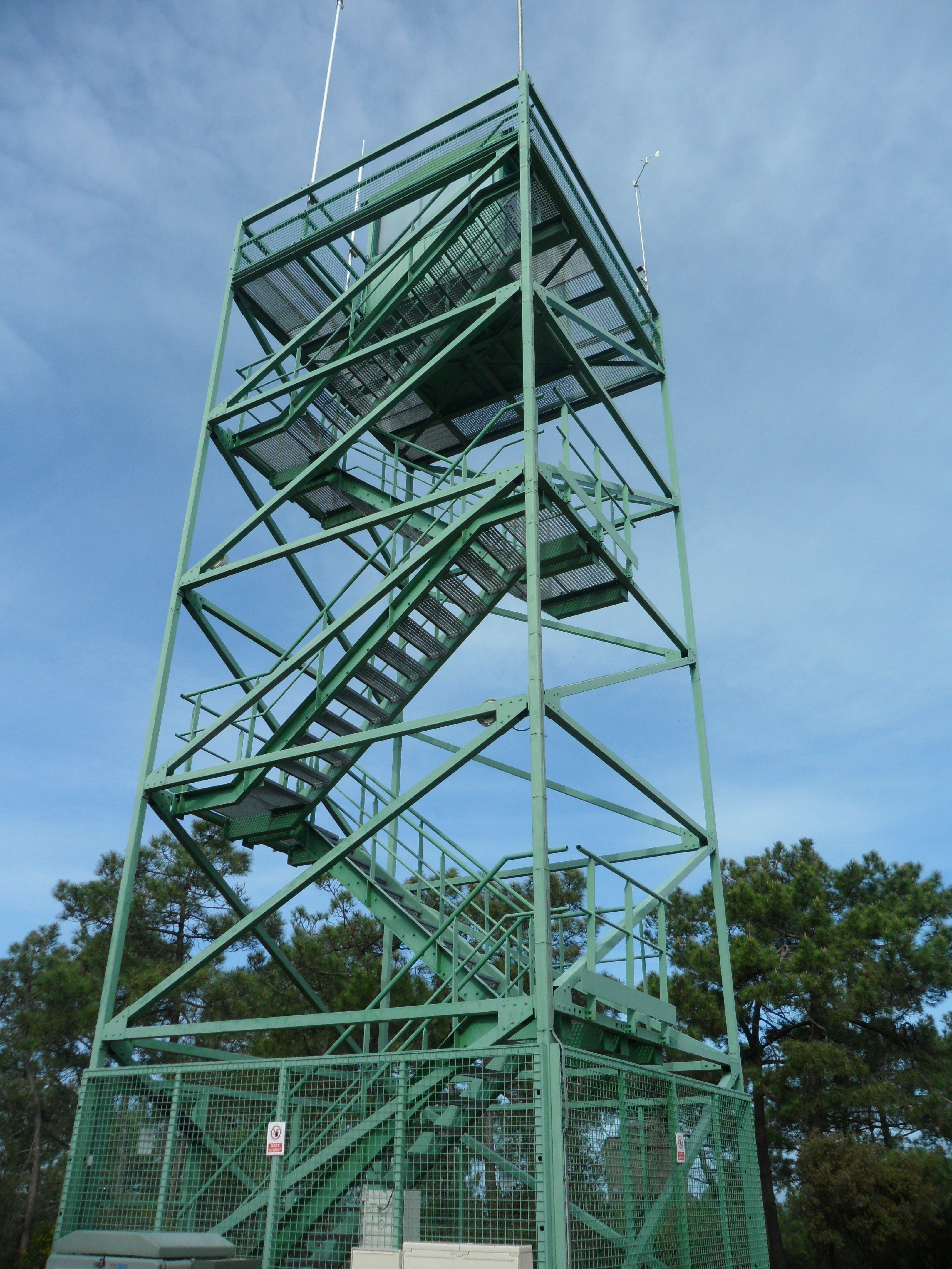 La tour des Brisquettes en 2012